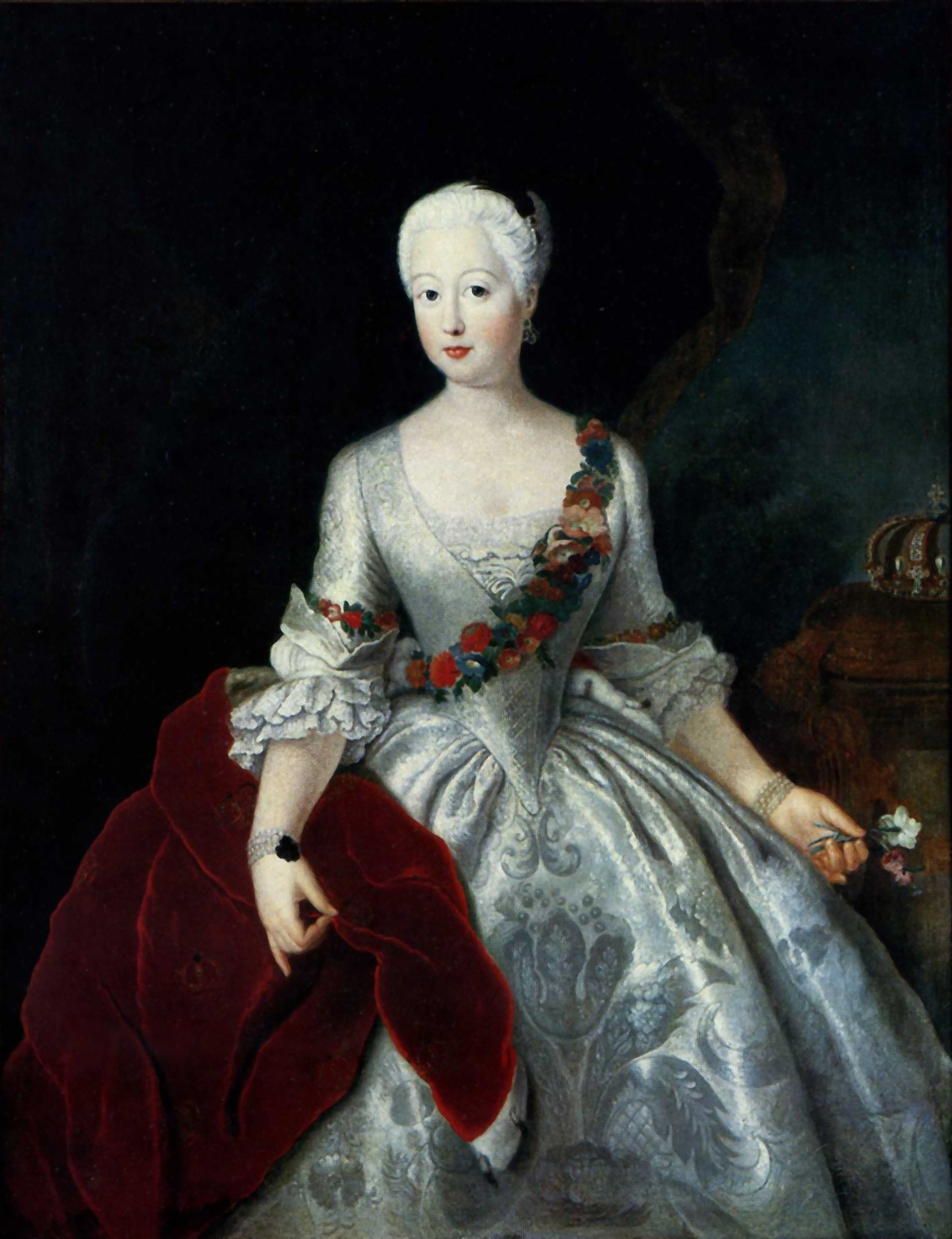 Anna Amalie, Prinzessin von Preußen.